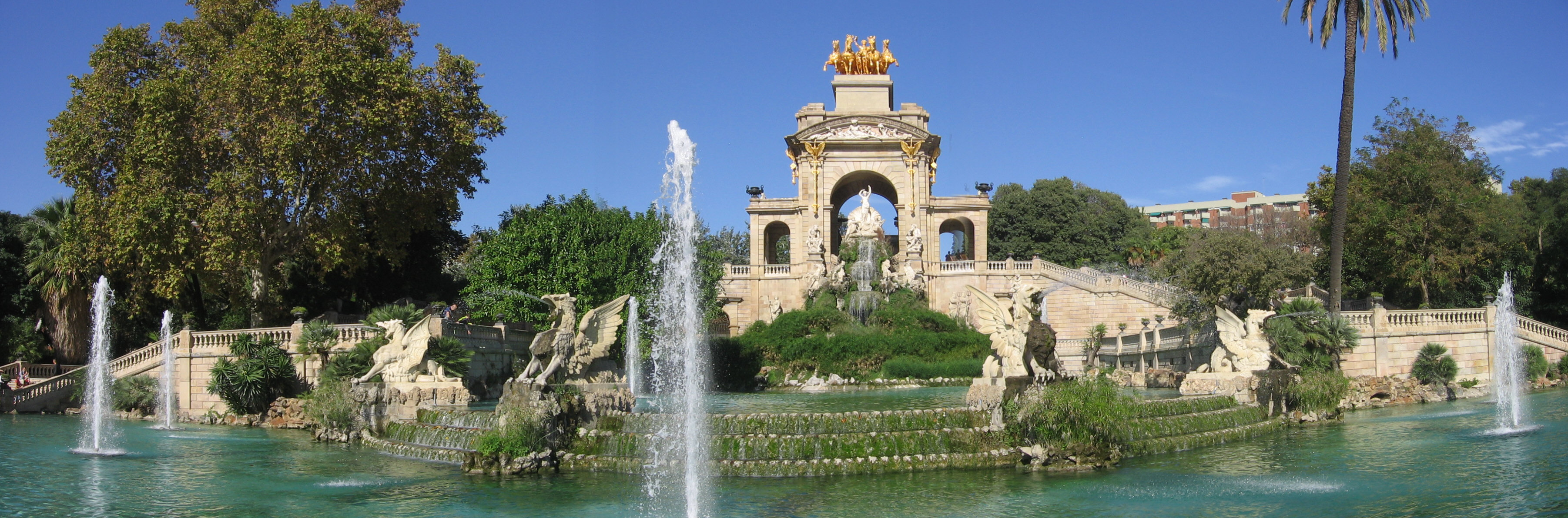 Cascada del Parque de la Ciudadela.